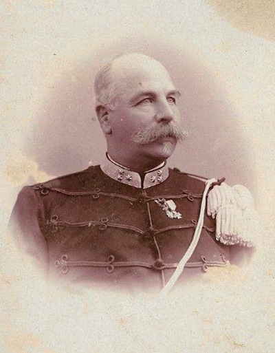 Jhr. Jan Eduard Adriaan Meijer